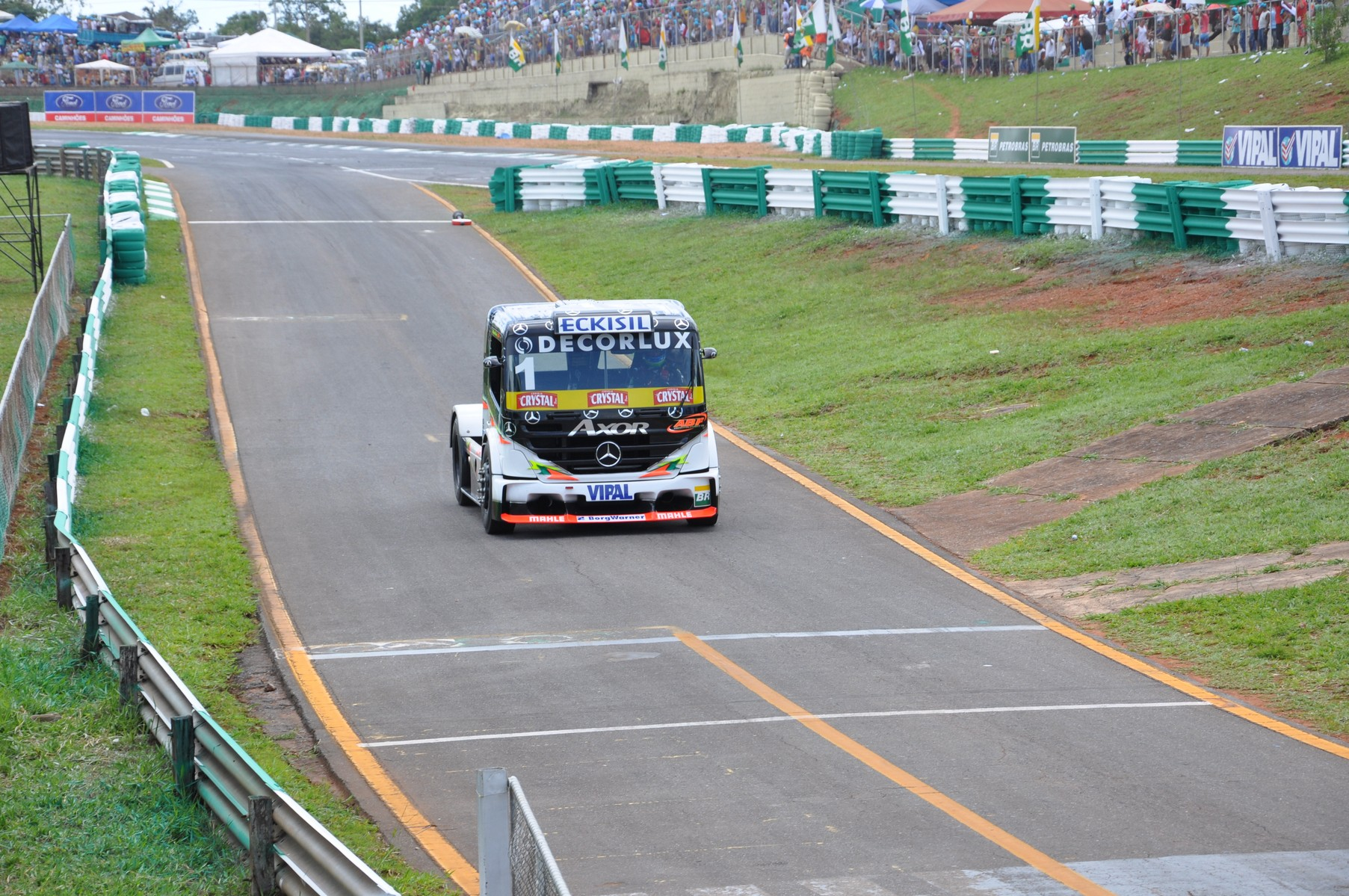 Fórmula Truck 2009